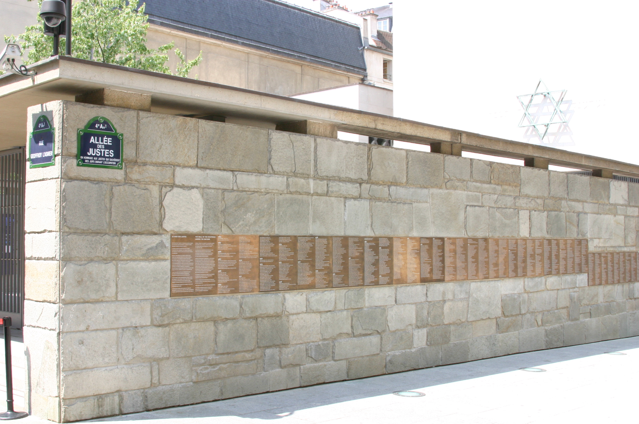 Mur des Justes à Paris